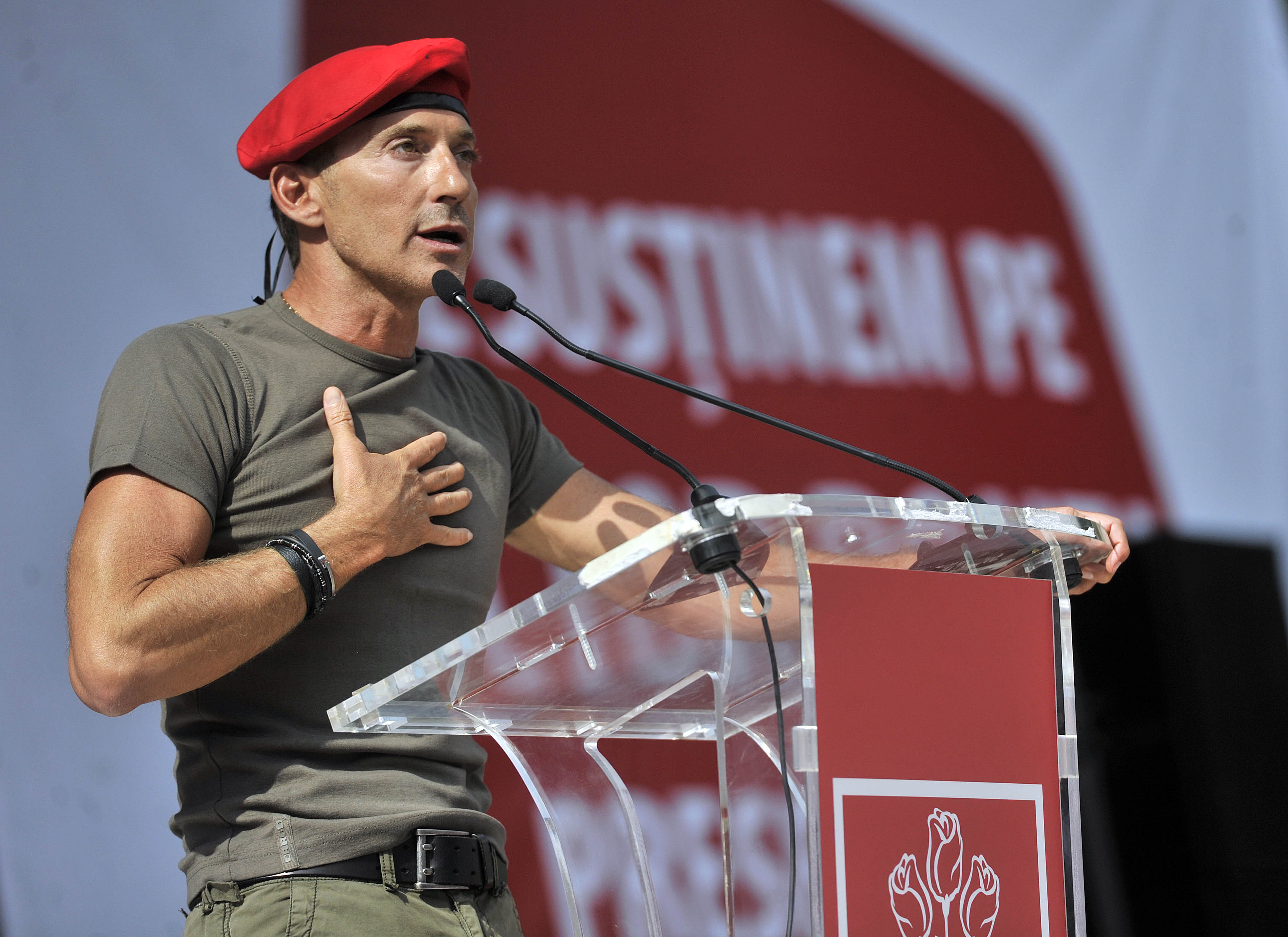 Evenimentul #TSDRULZ, Constanta - 05.09 (9)